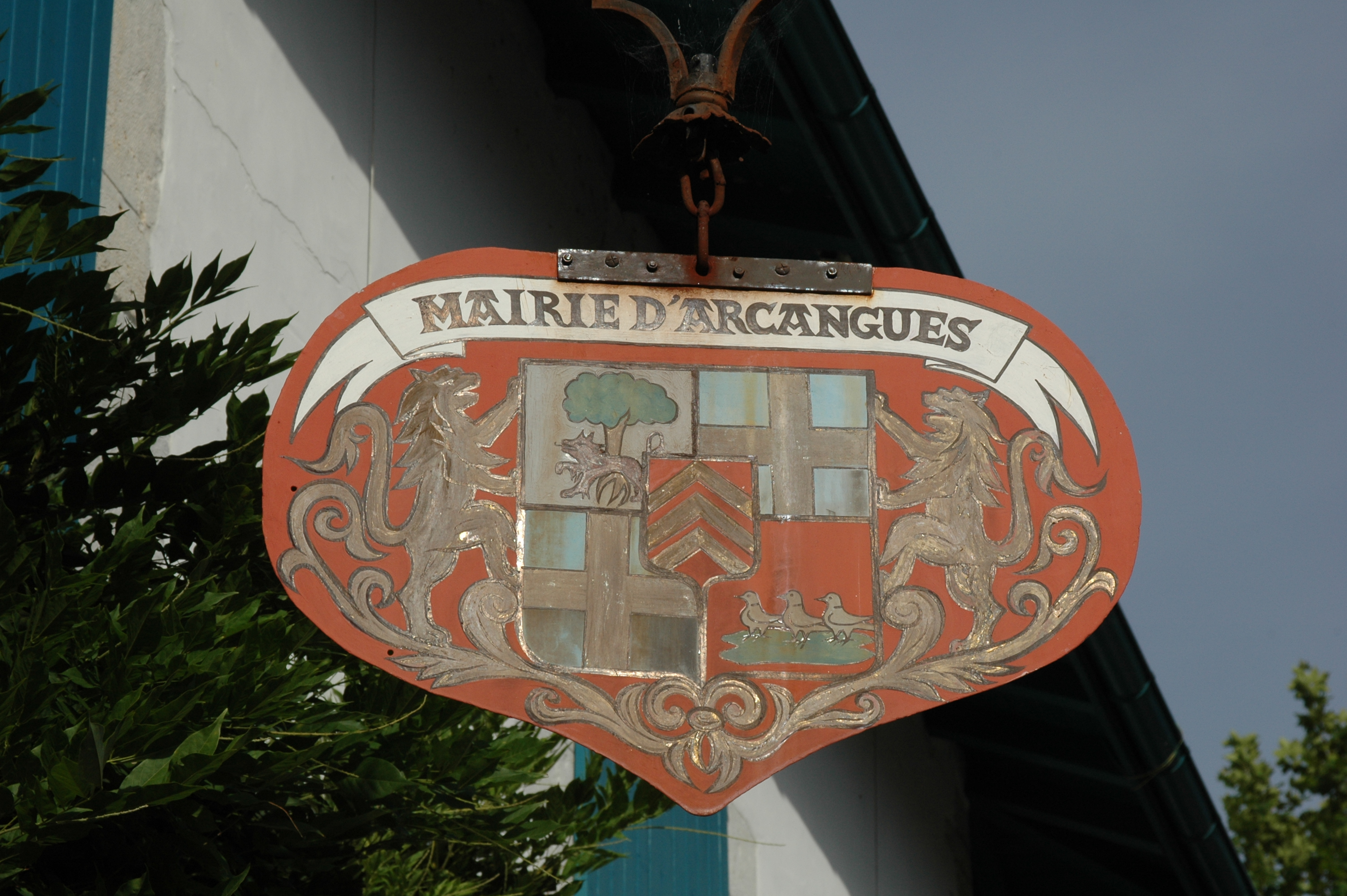 Arcangues, blason